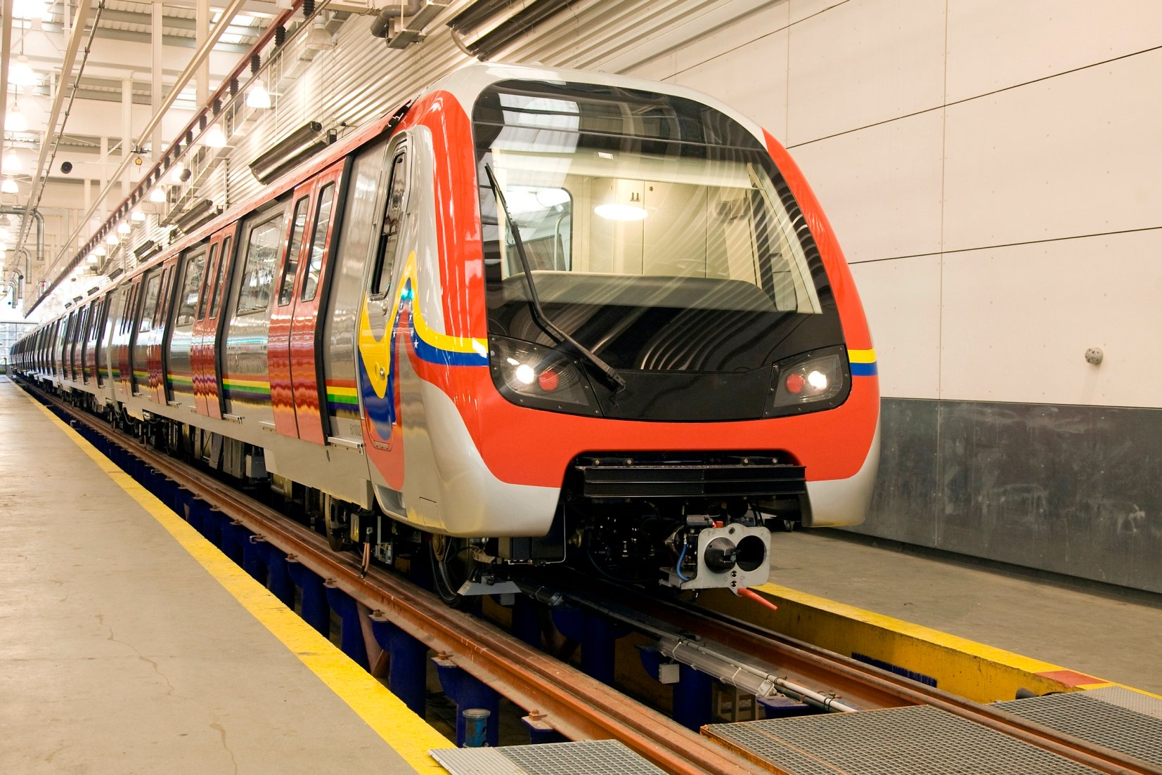 Nueva línea 1 del Metro de Caracas